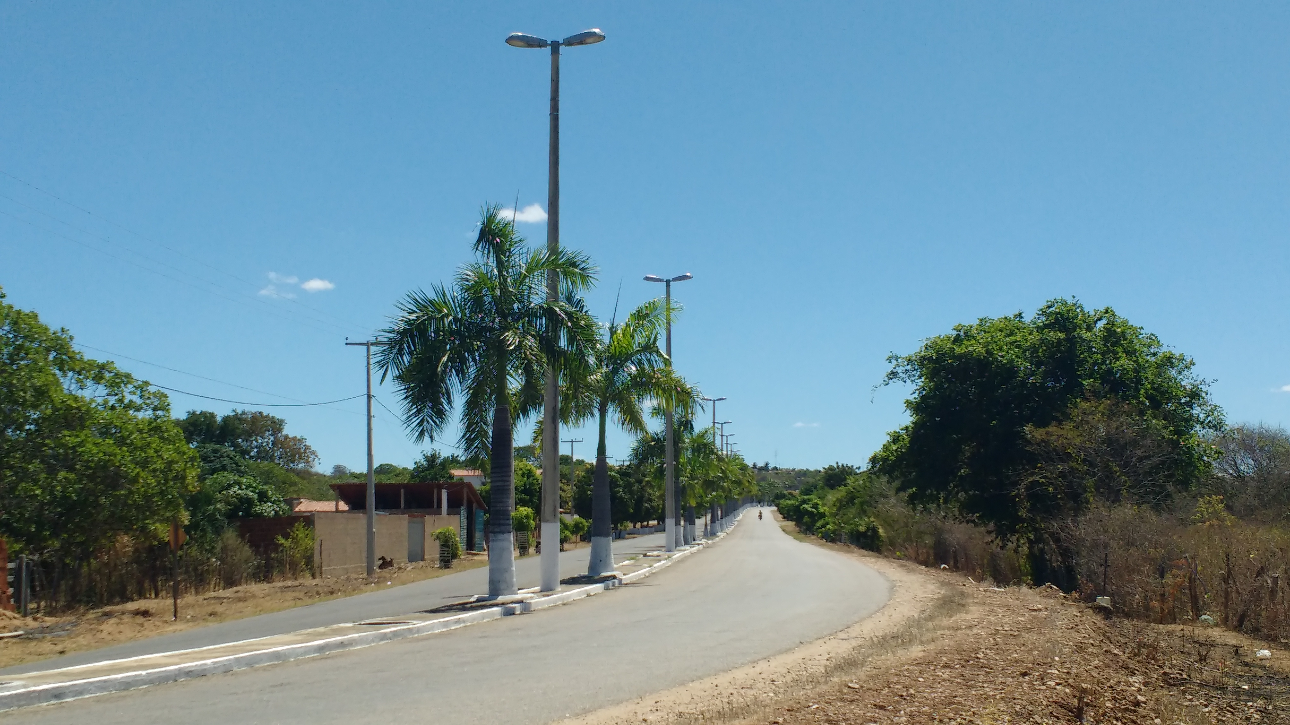 Avenida Senhora Santana, na entrada de Luís Gomes, Rio Grande do Norte (Brasil).